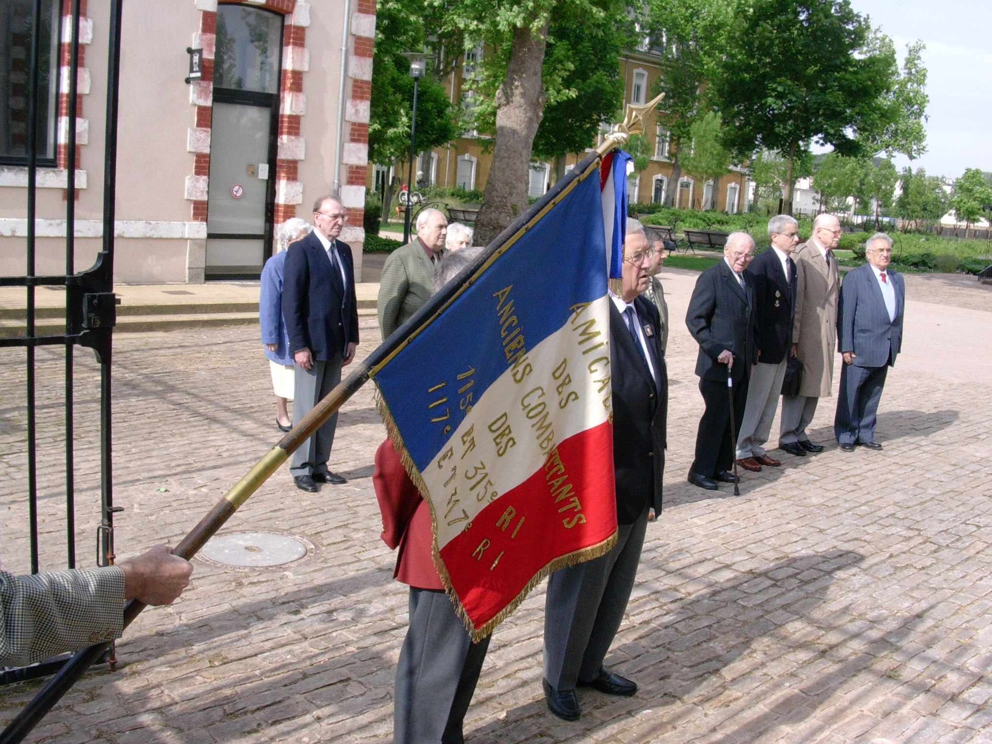 porte drapeau de l'amicale des 115e 315e 117e 317e 271e R.I, à l'ancienne caserne du 117e RI cérémonie le 20 mai 2007 au mans.